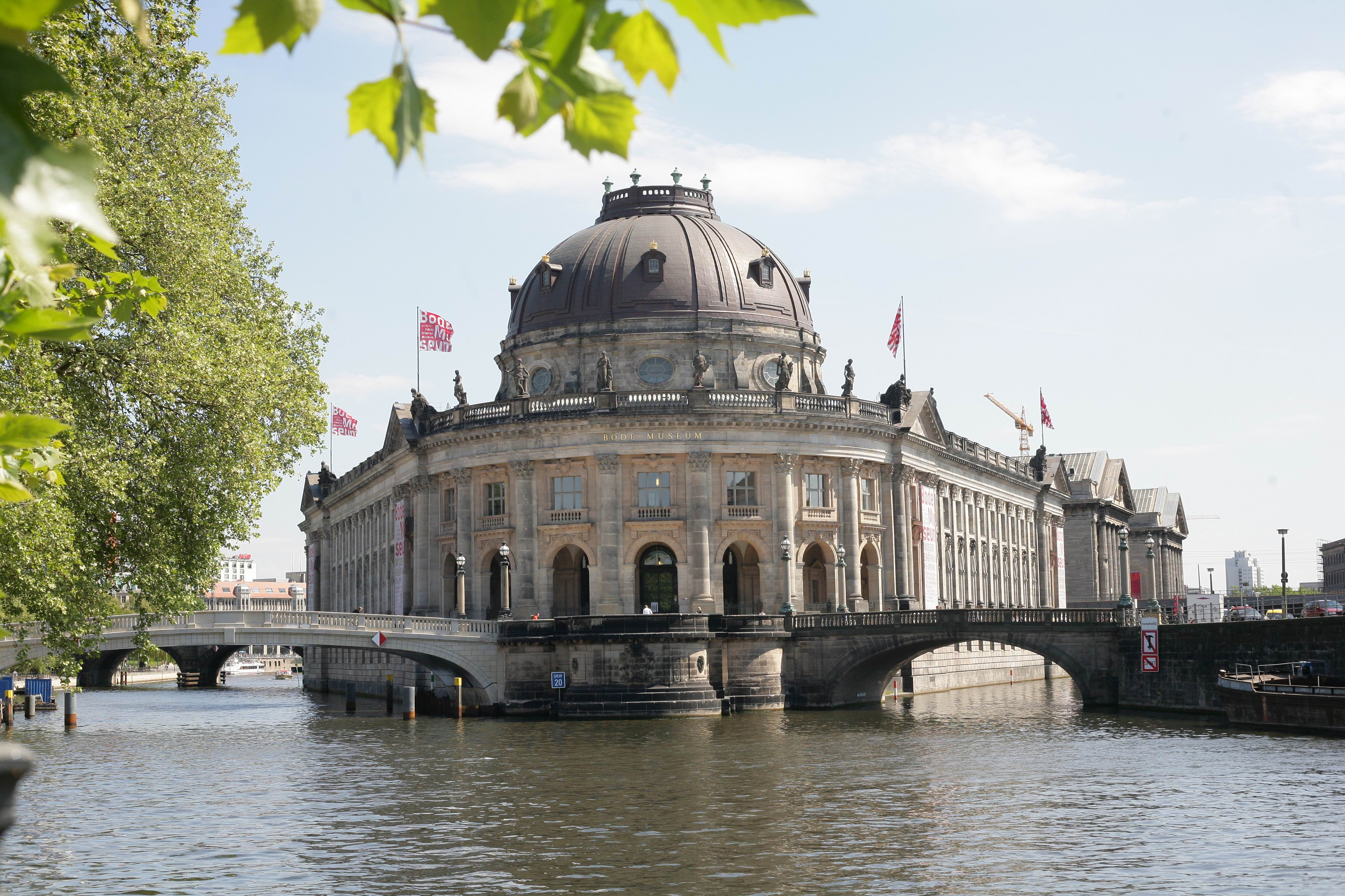 Bode-Museum Berlin, Deutschland